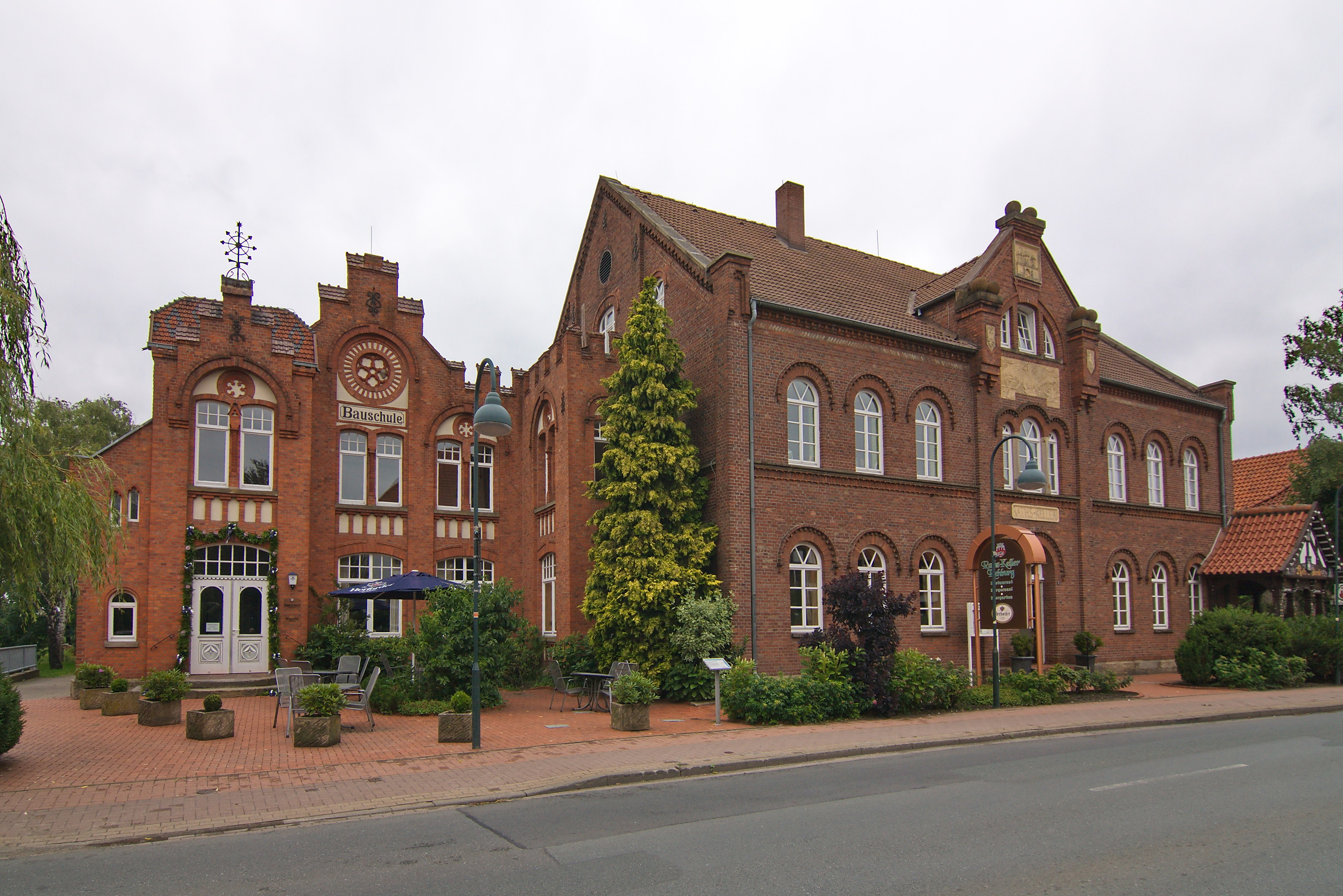 Bauschule und Ratskeller in Rehburg (Rehburg-Loccum) in Niedersachsen